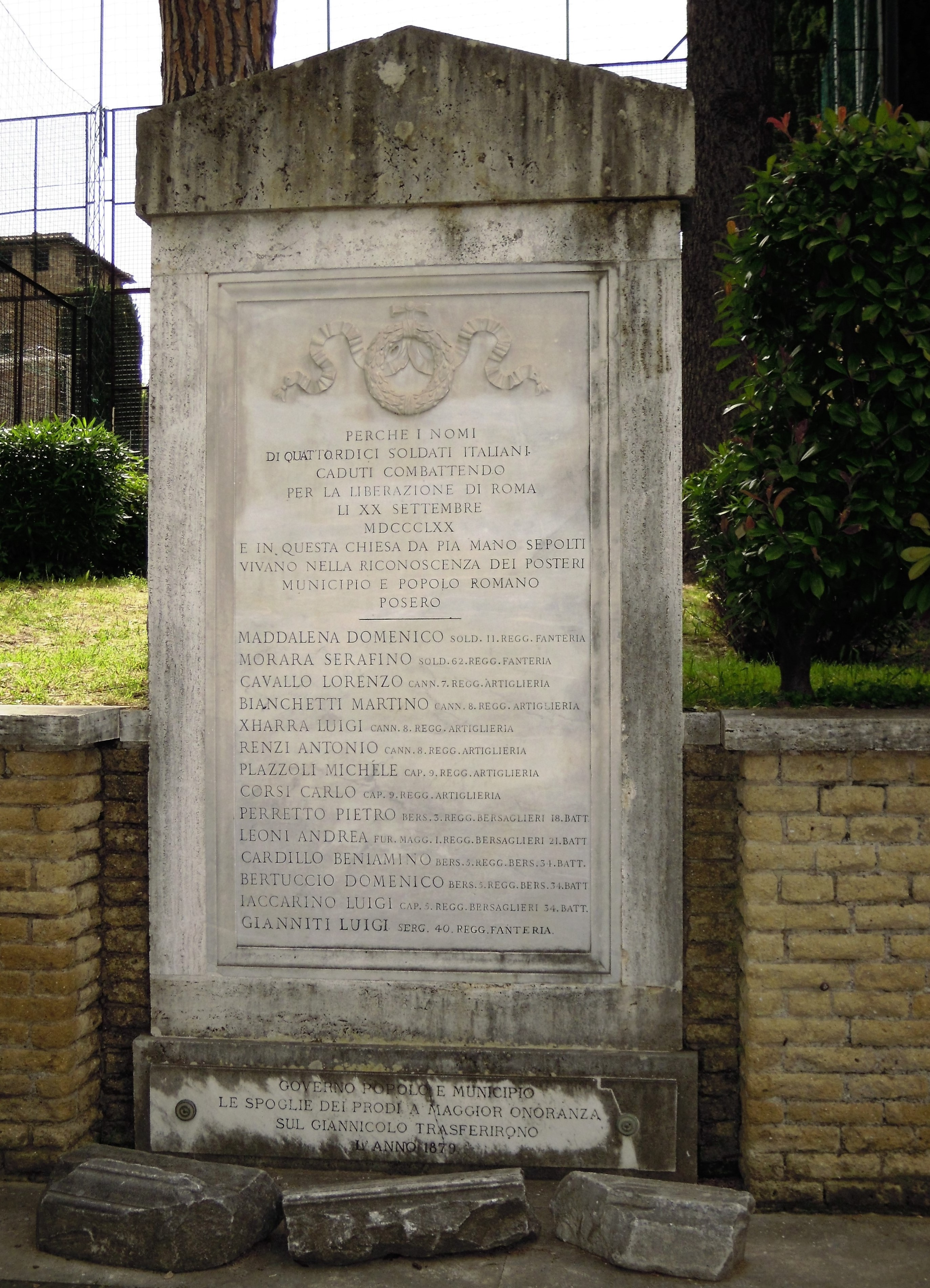 Roma, esterno del Mausoleo di Santa Costanza: stele in ricordo dei soldati italiani caduti nella presa di Porta Pia (20 settembre 1870)